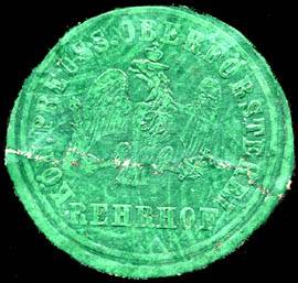 Sealing stamp Title: Königlich Preussische Oberförsterei - Rehrhof Description: grün, geprägt Place: size: 3 cm